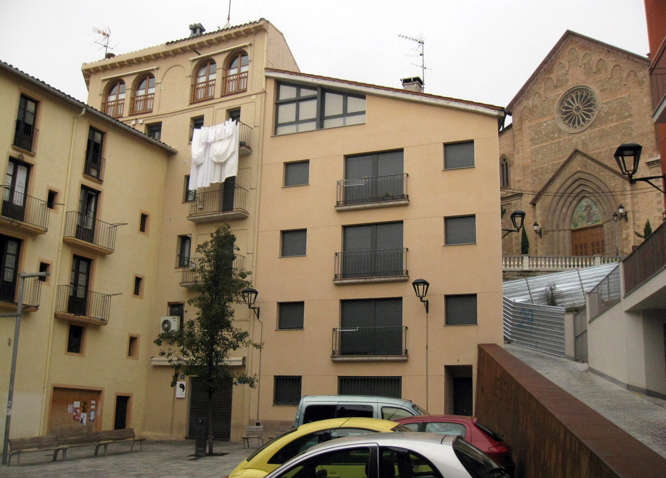 Plaça del Forn (Berga)